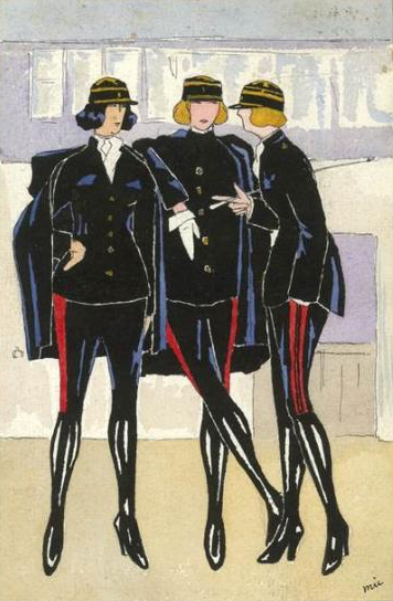 Uniforme féminin à l'École polytechnique, imaginé par Robert Blancherie, X1921. Légende du dessin : "Vu la pénurie des cadres le recrutement des élèves de l’École polytechnique sera mixte à partir de 1924 (les journaux), signé Mic [ndlr : Robert Blancherie X1921].